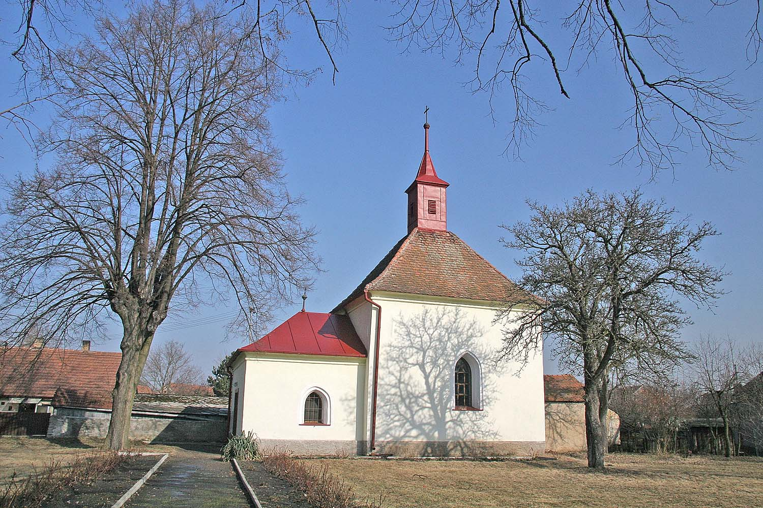 Kostel Svatého Mikuláše na návsi v obci Svatý Mikuláš v okrese Kutná Hora